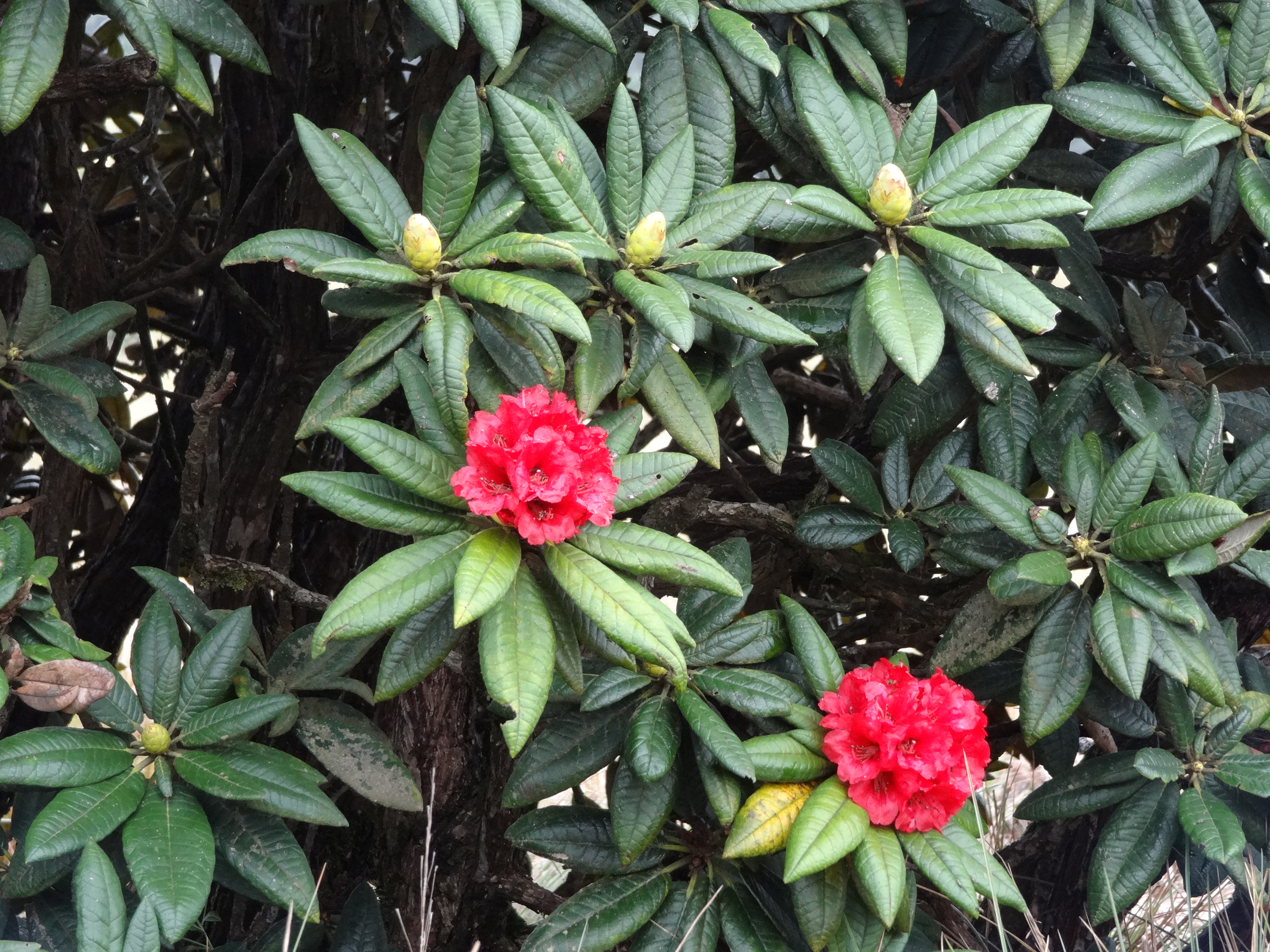 Horton Plains National Park